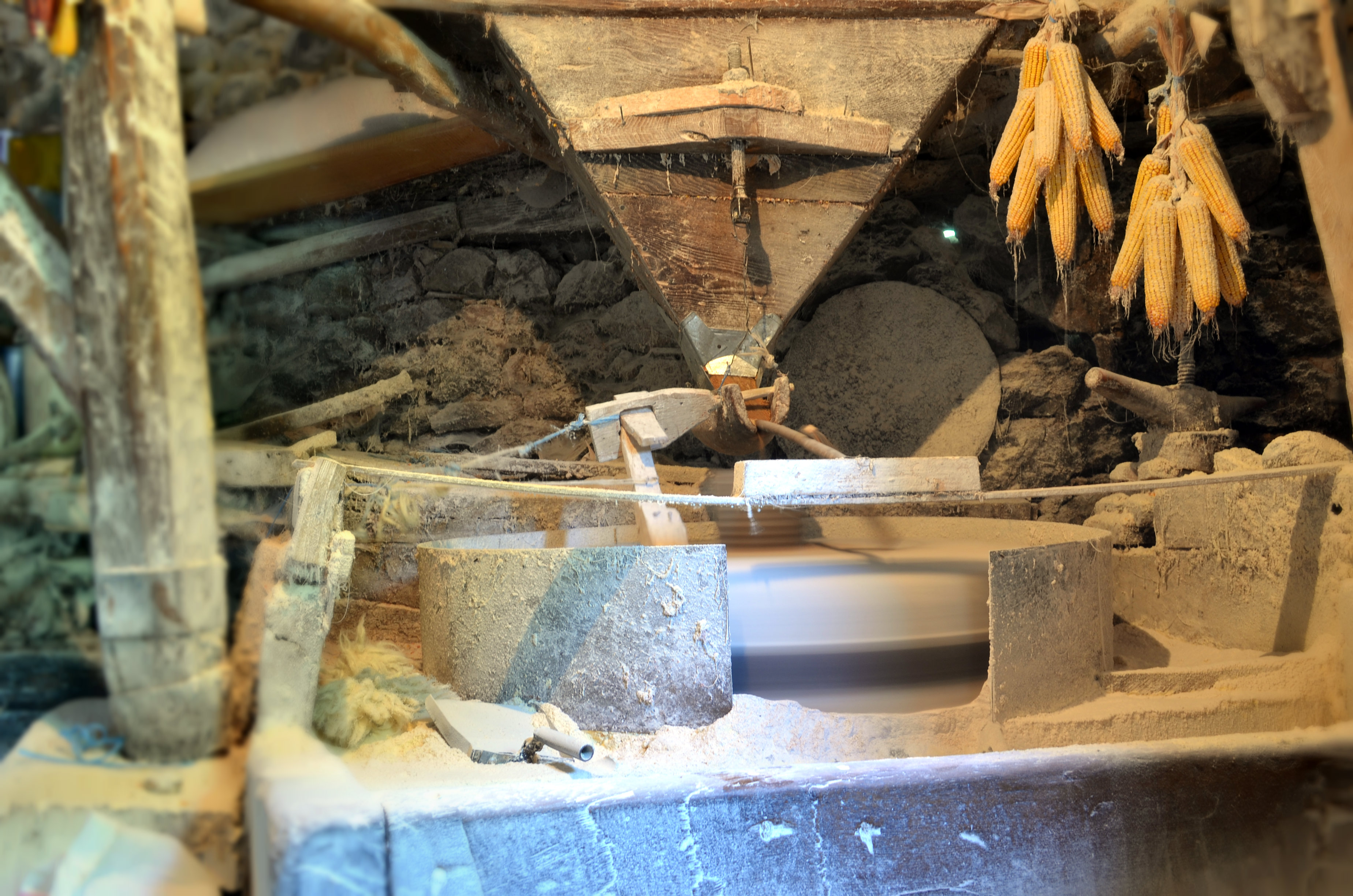 Vodenica vo vevcani, ohridsko